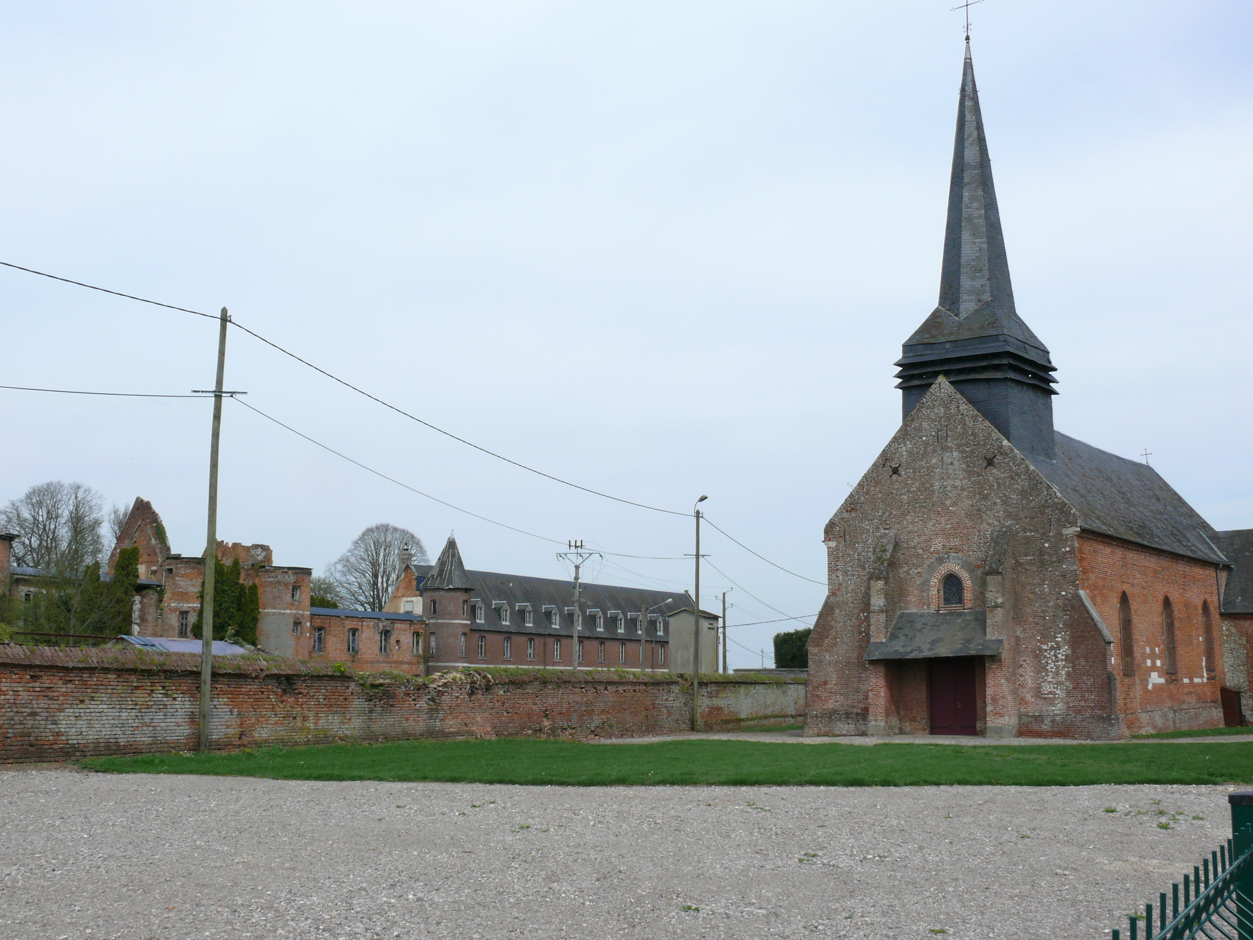 Eglise et Château de Beaucamps-le-Jeune